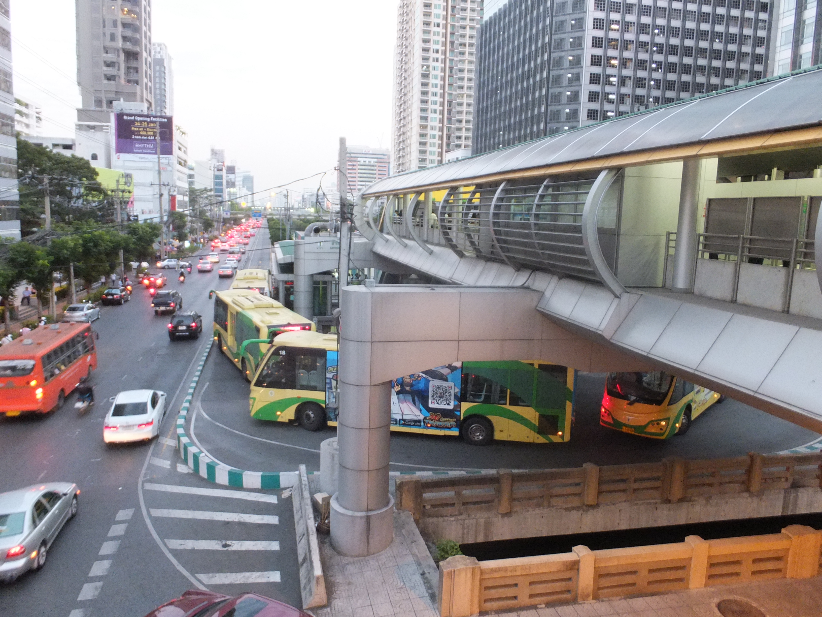 バンコクBRTチョーンノンシー駅のりば。※タイトル間違い（BRTにチョーンノンシー駅はない。サートン駅の間違い）